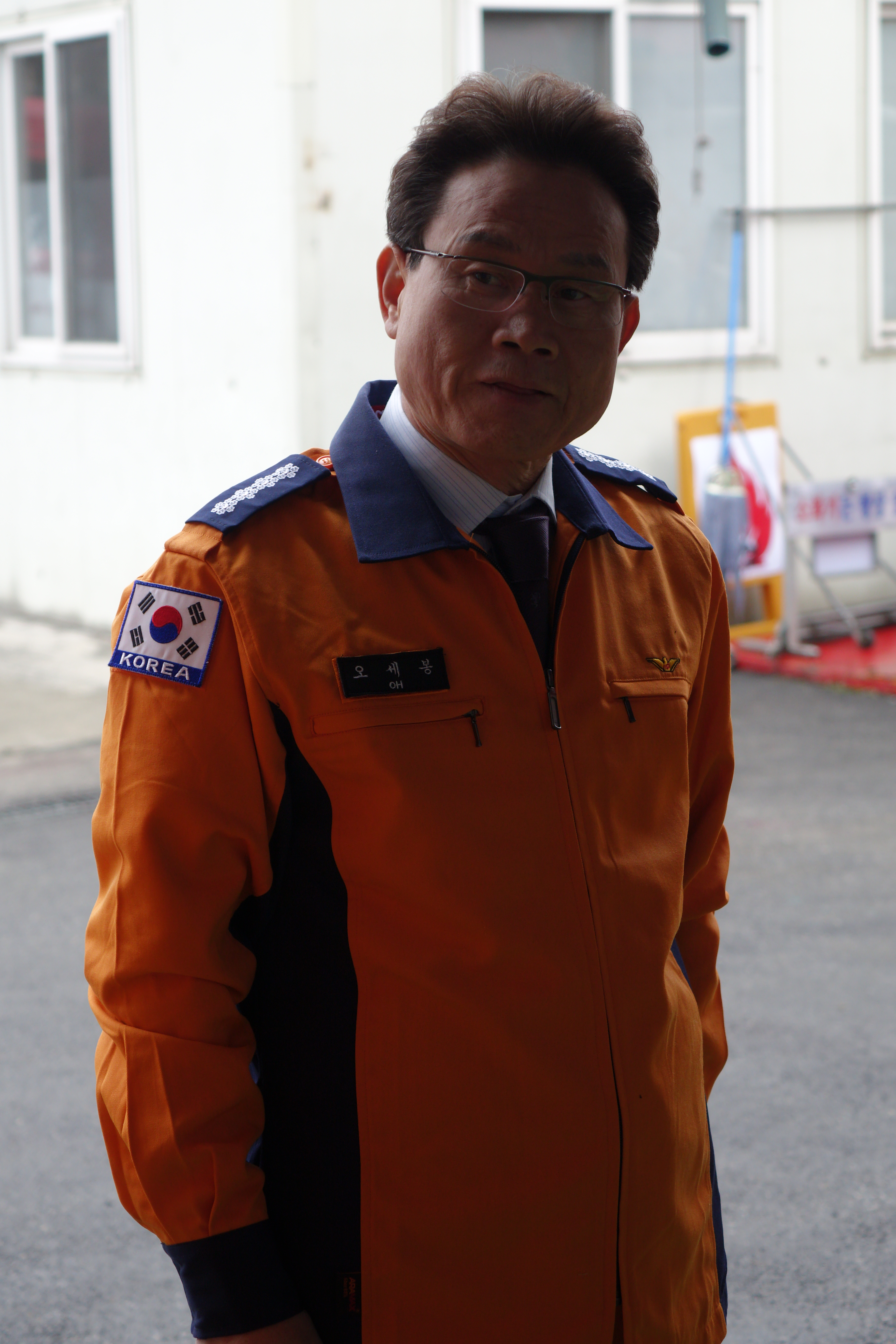 오세봉, 2015년 12월 강원도 강릉시 강릉소방서 강원도의회 의원 오세봉 명예소방서장 위촉식